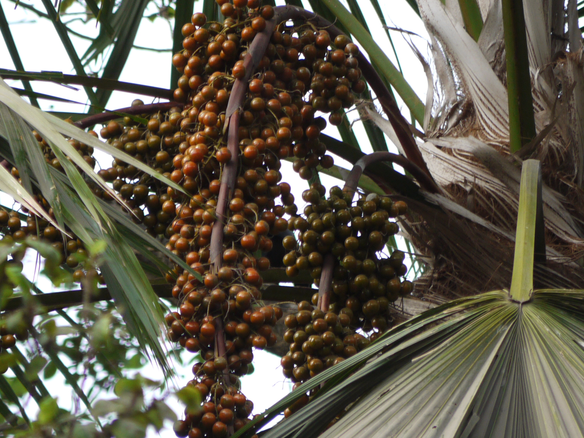 Livistona rotundifolia